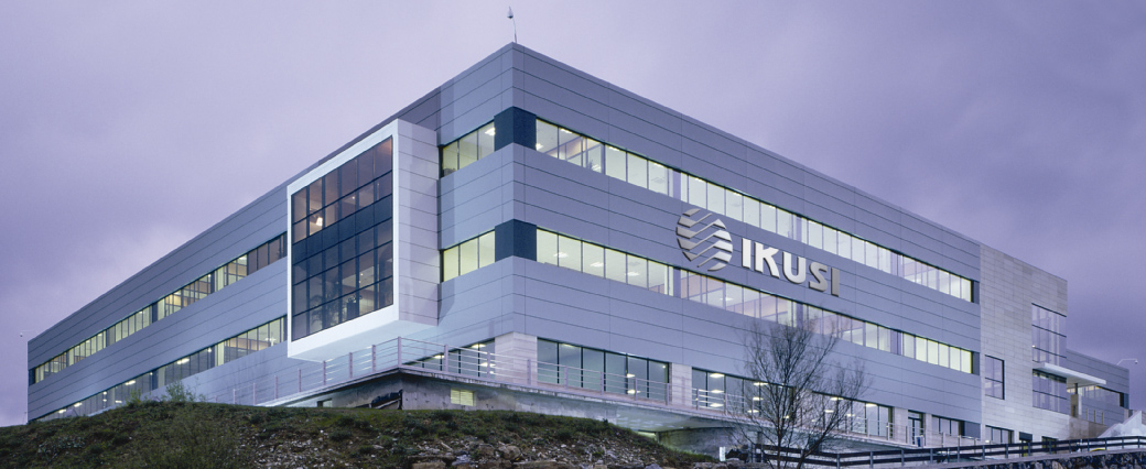 Fachada Ikusi